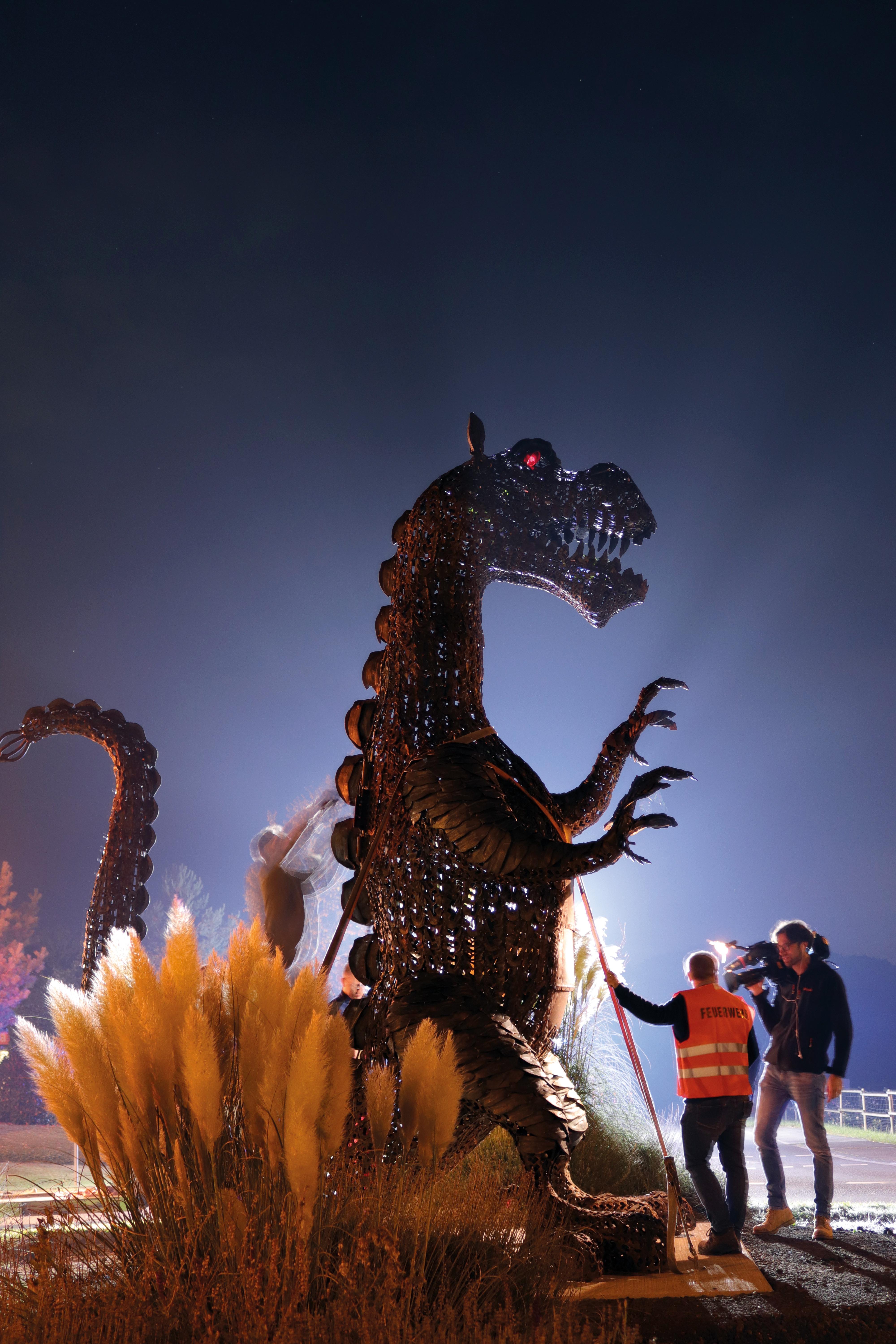 Der Wachtberger Drache kurz nach seiner Platzierung auf der Mittelinsel des Kreisverkehrs vor dem Einkaufszentrum am Wachtbergring, Gemeinde Wachtberg. Sebastian Tittelbach interviewt für die WDR Lokalzeit Bonn den Vorsitzenden vom Förderverein für Kunst und Kultur in Wachtberg e. V., Herrn Alfred Schneider.